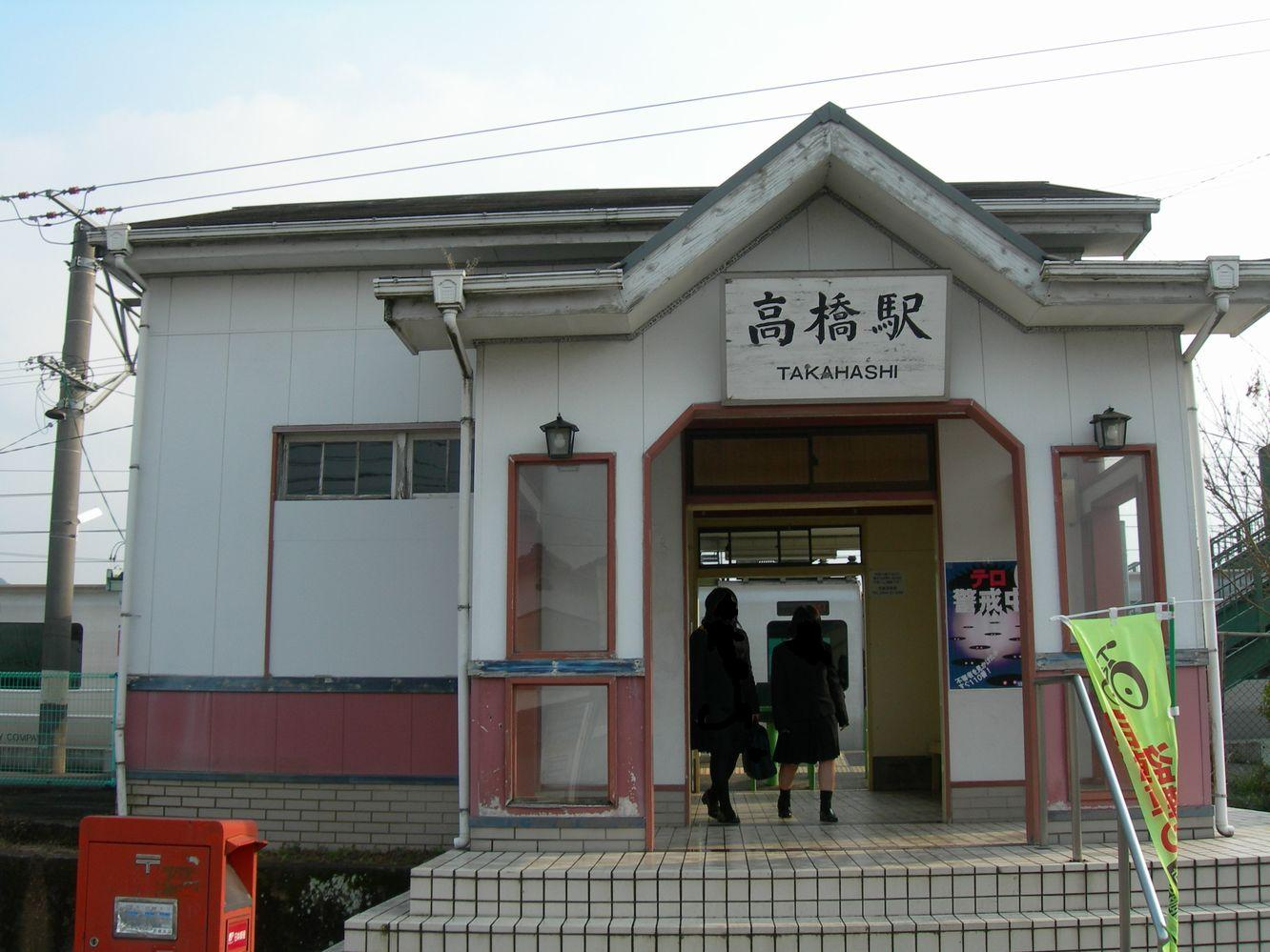 高橋駅